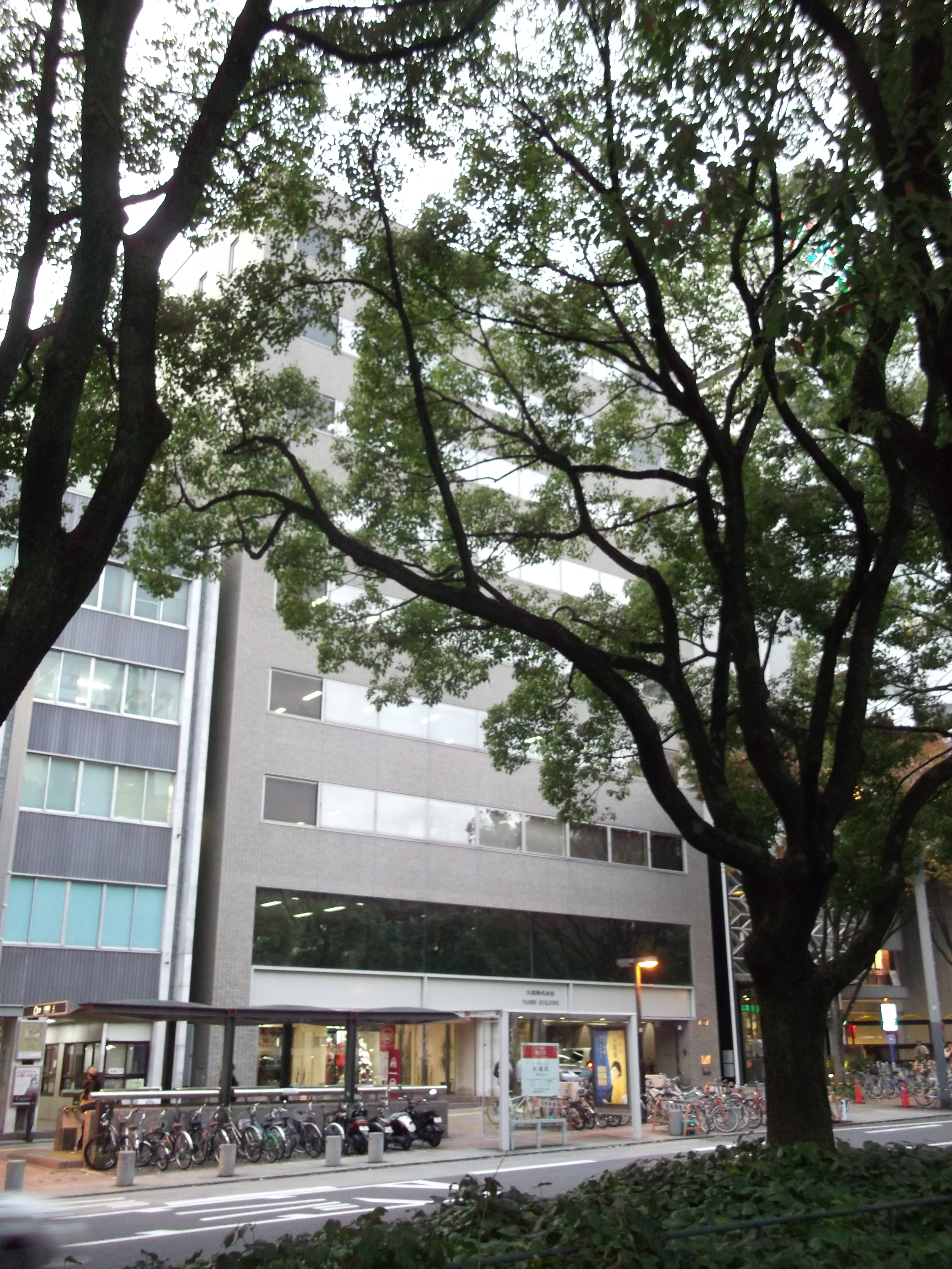 名古屋市中区の大成本社を東側公道（久屋大通公園）南側より撮影